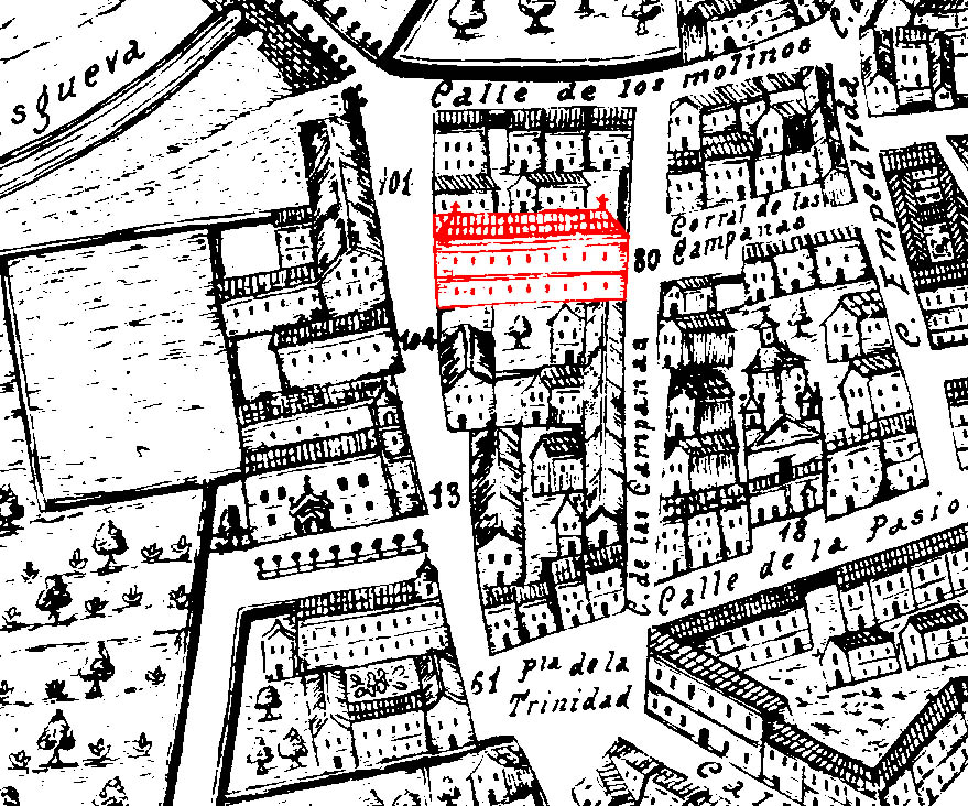 Plano de la ciudad de Valladolid, España. Recorte parcial para localizar el lugar donde se encontraba el Teatro de la Comedia. Plano de Ventura Seco 1738.